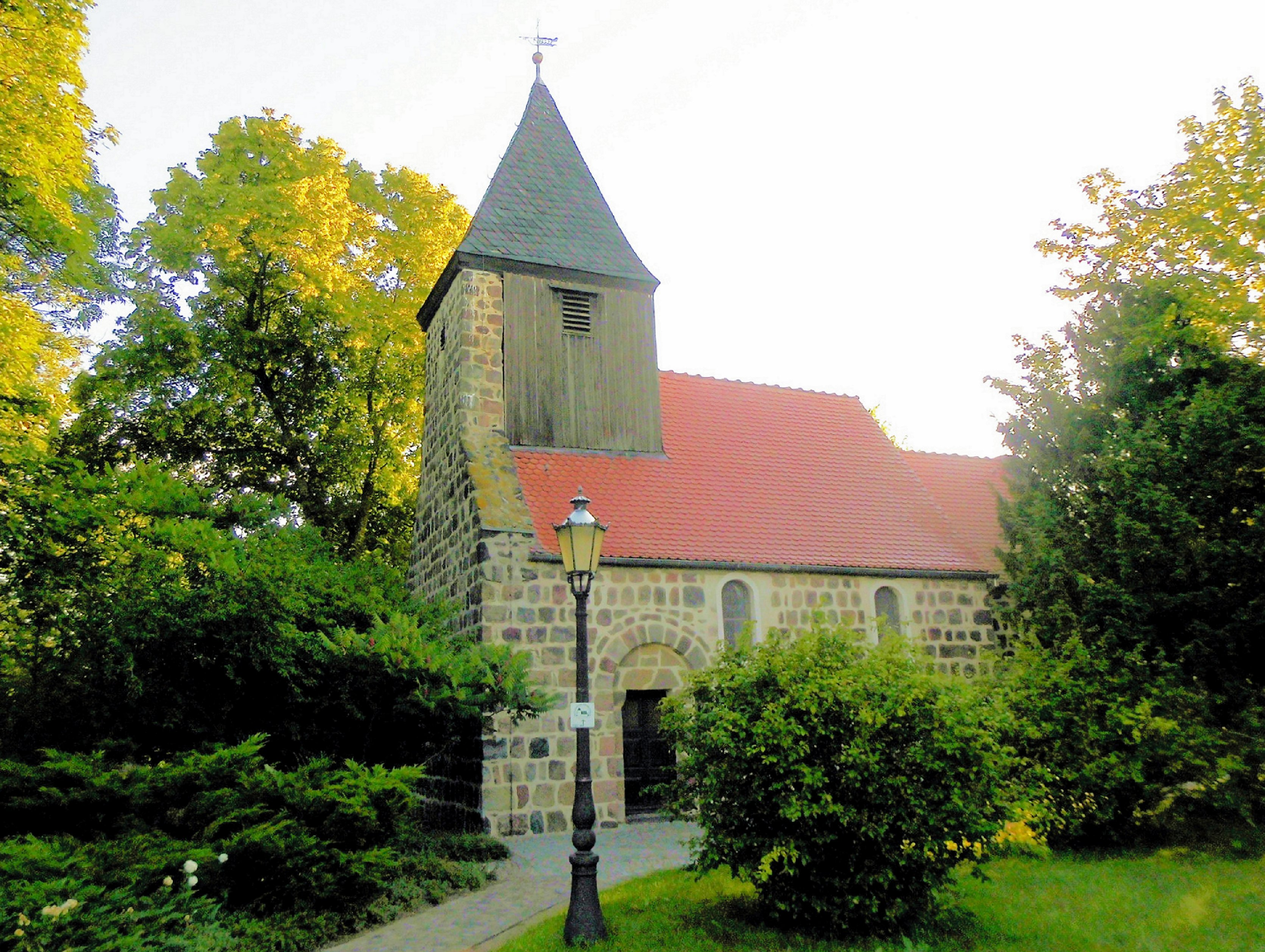 Evangelische Kirche in Apollensdorf, Stadt Lutherstadt Wittenberg, Landkreis Wittenberg, Deutschland